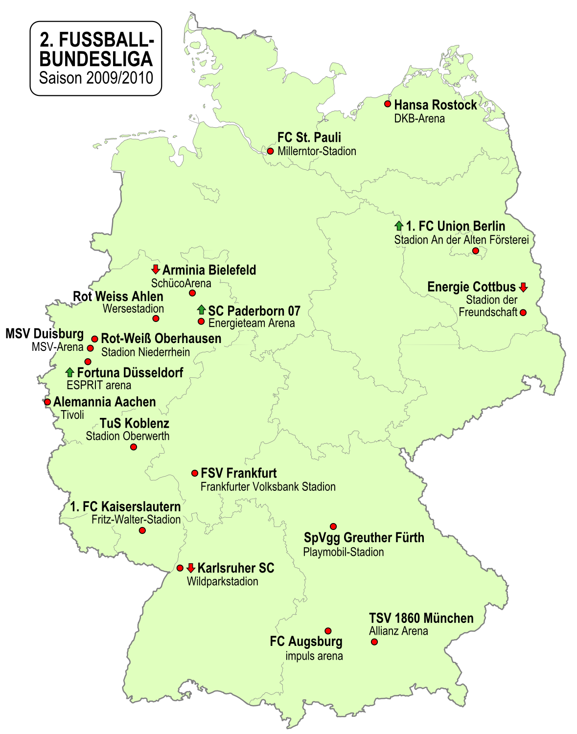 Karte der Vereine der 2. Fußball-Bundesliga-Saison 2009/2010